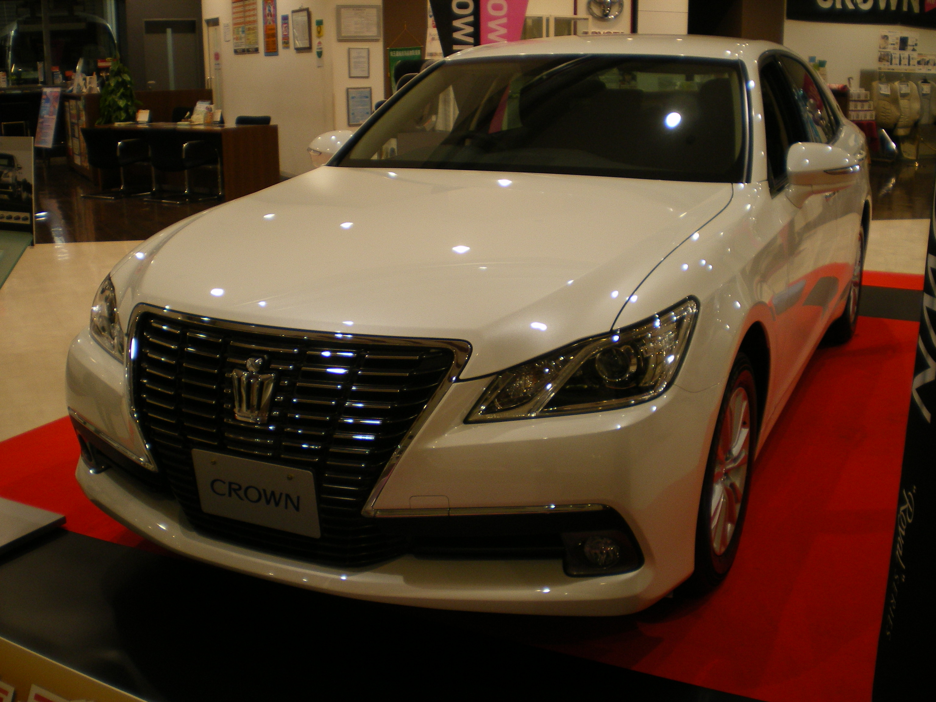 トヨタ・クラウン